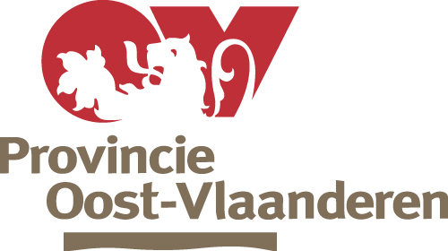 Logo Oost-vlaanderen Logo